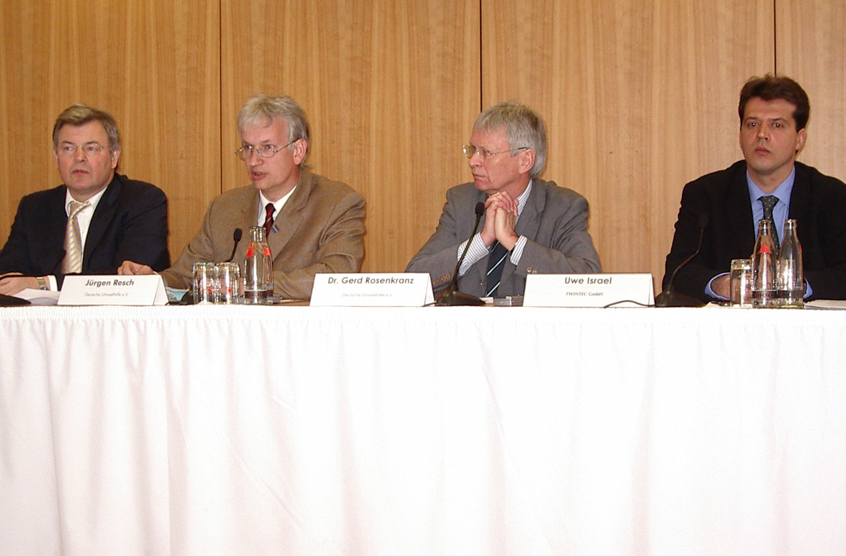 DUH Pressekonferenz am 04.04.2005